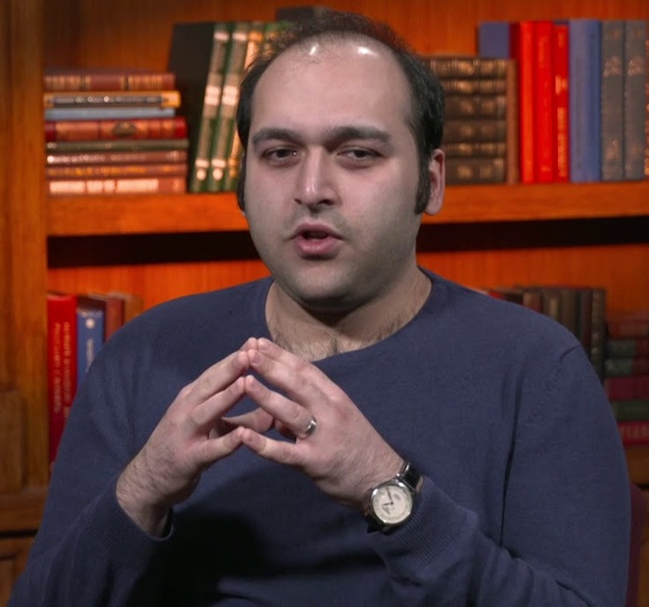 Turqut Qəmbər 2018-ci ildə